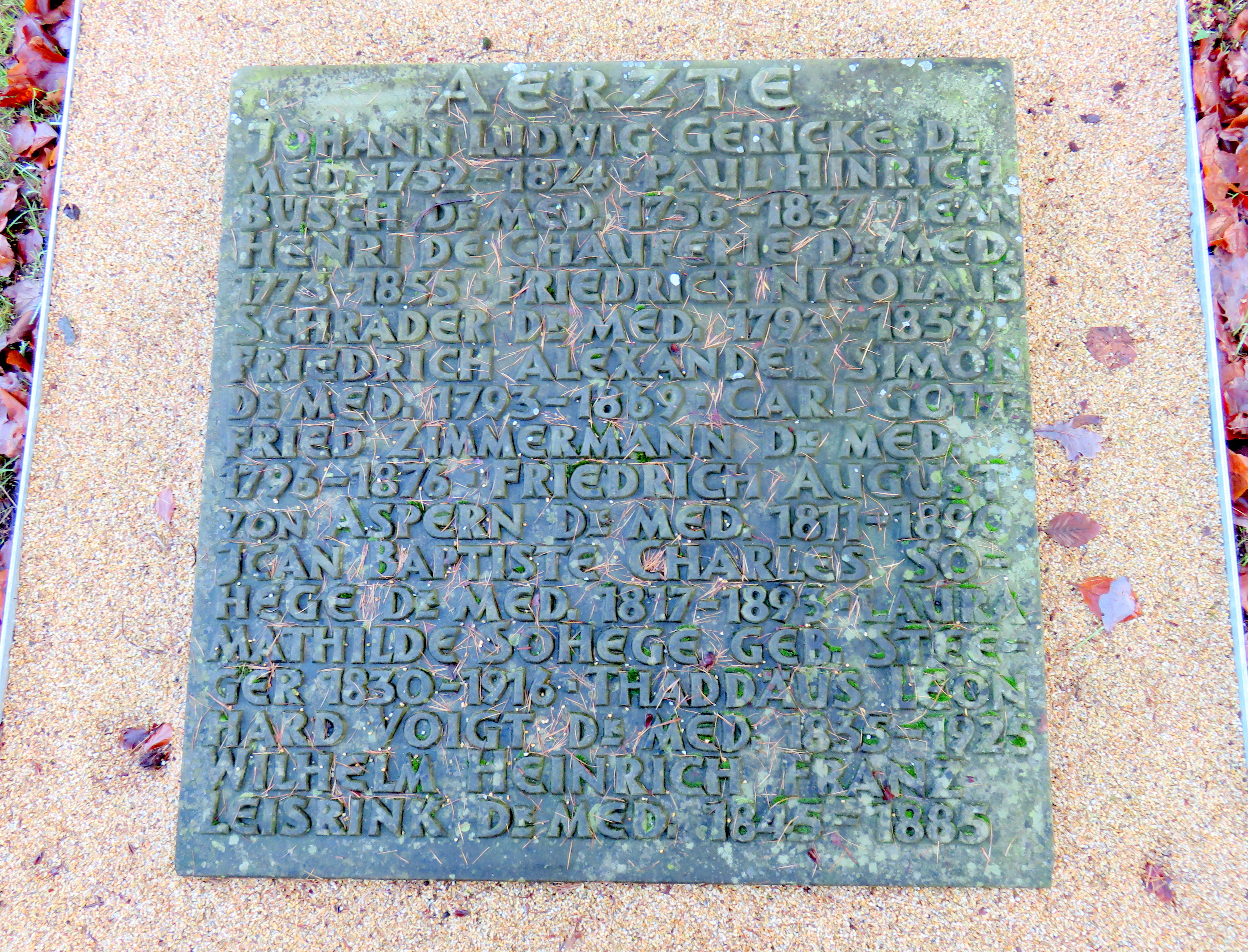 Sammelgrabmal Aerzte im Bereich des Althamburgischen Gedächtnisfriedhofs auf dem Hamburger Friedhof Ohlsdorf zu Ehren von unter anderen Johann Heinrich de Chaufepié, Friedrich Alexander Simon, Friedrich August von Aspern, Thaddäus Leonhard Voigt, Heinrich Wilhelm Franz Leisrink.